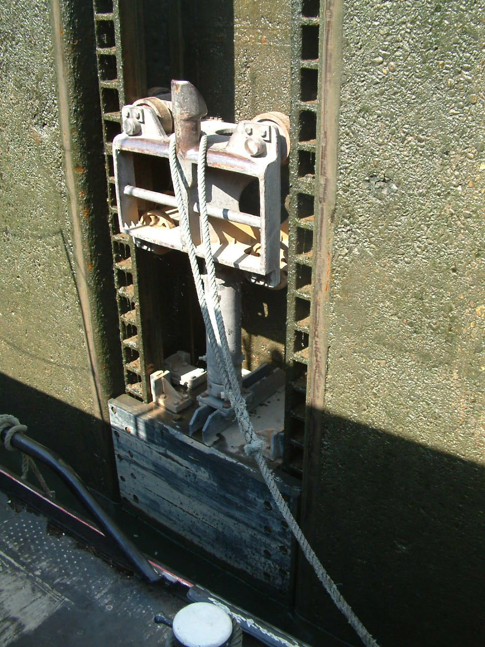 Drijvend bolder in een sluiswand